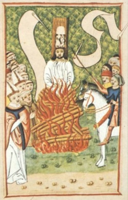 The Execution of John Hus